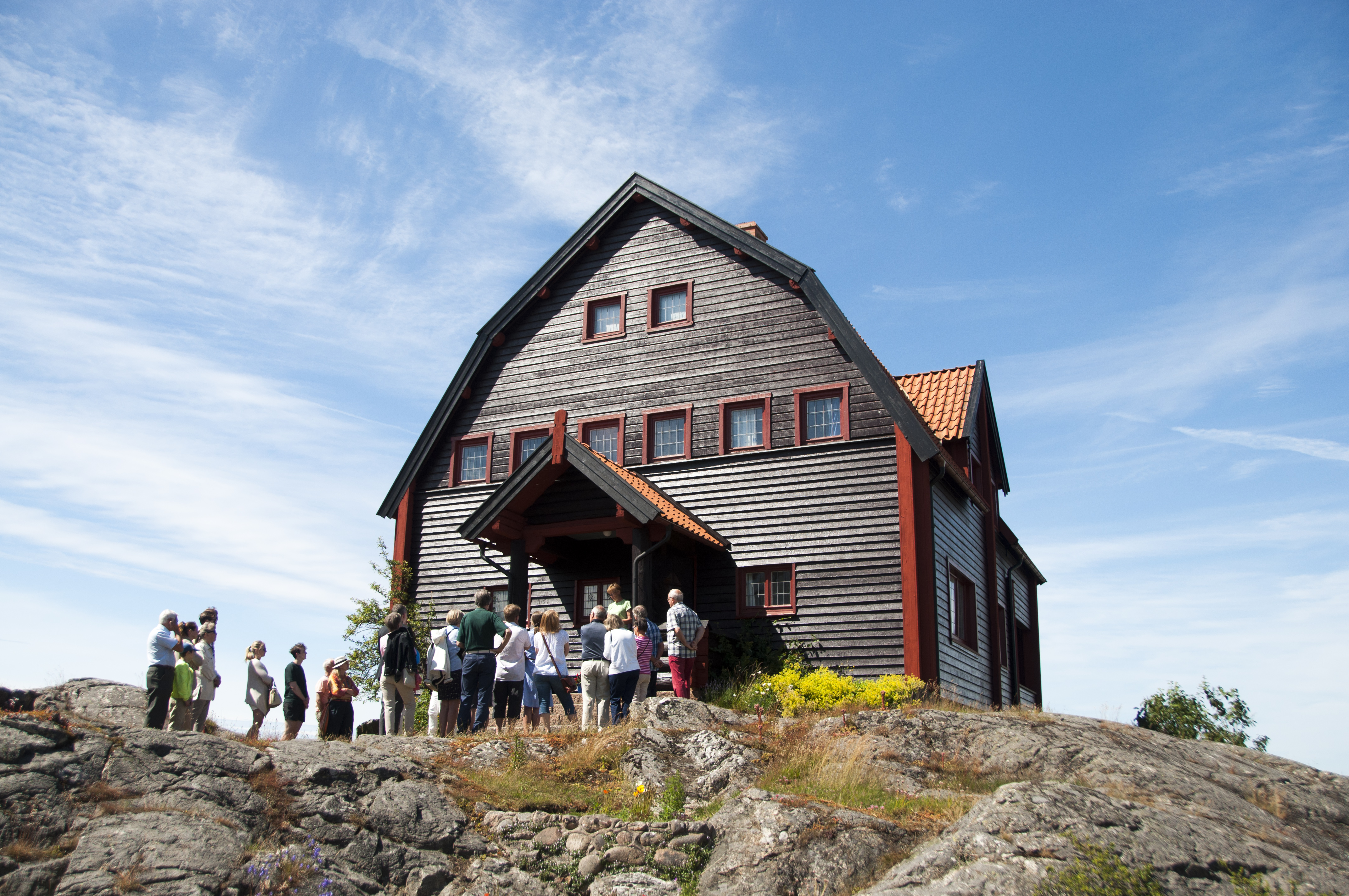 Carl Wilhelmsons ateljévilla i Fiskebäckskil. Byggnadsår 1913. Arkitekt Ivar Calmander.